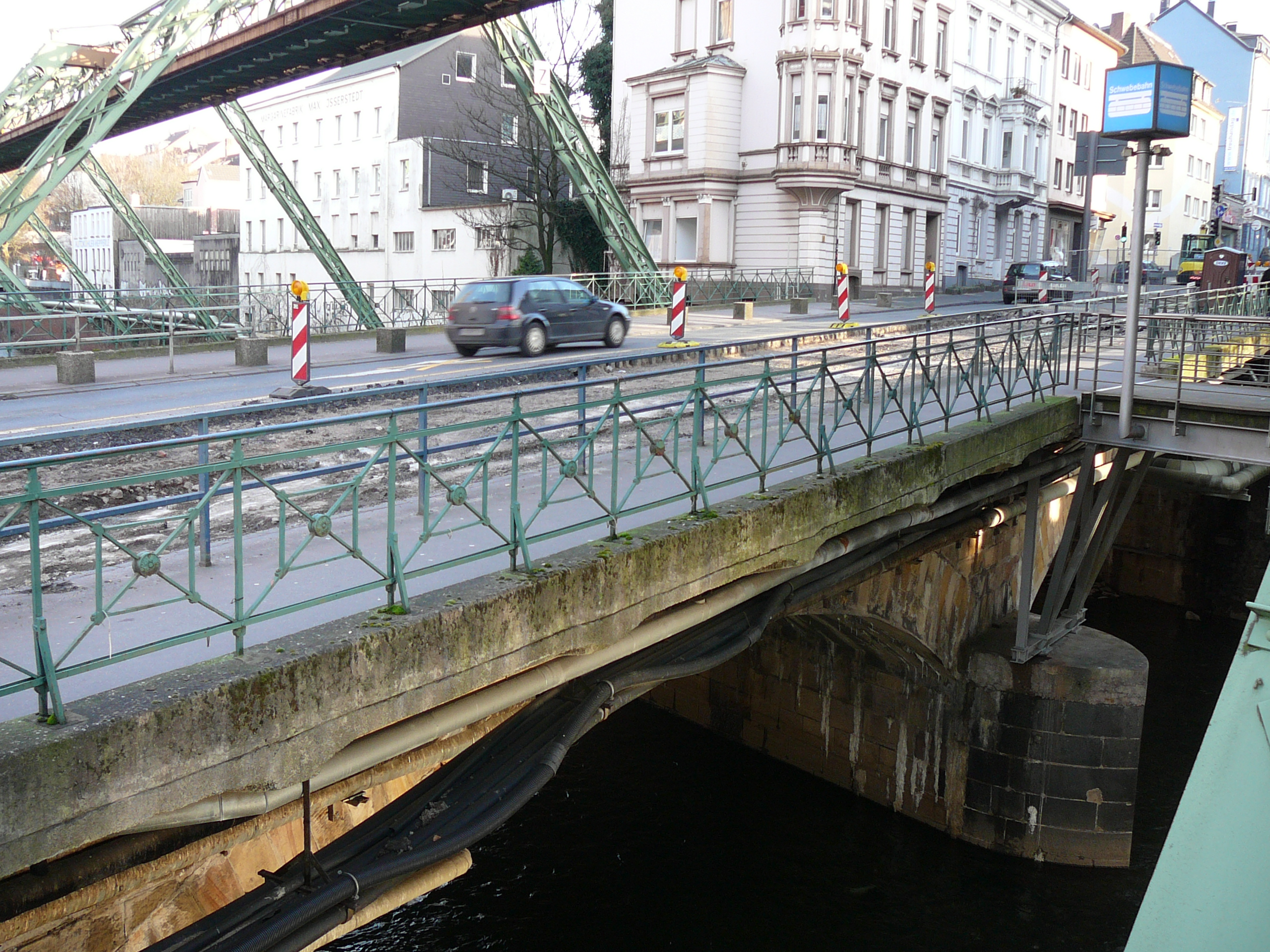 Wupperbrücke Tannenbergstraße